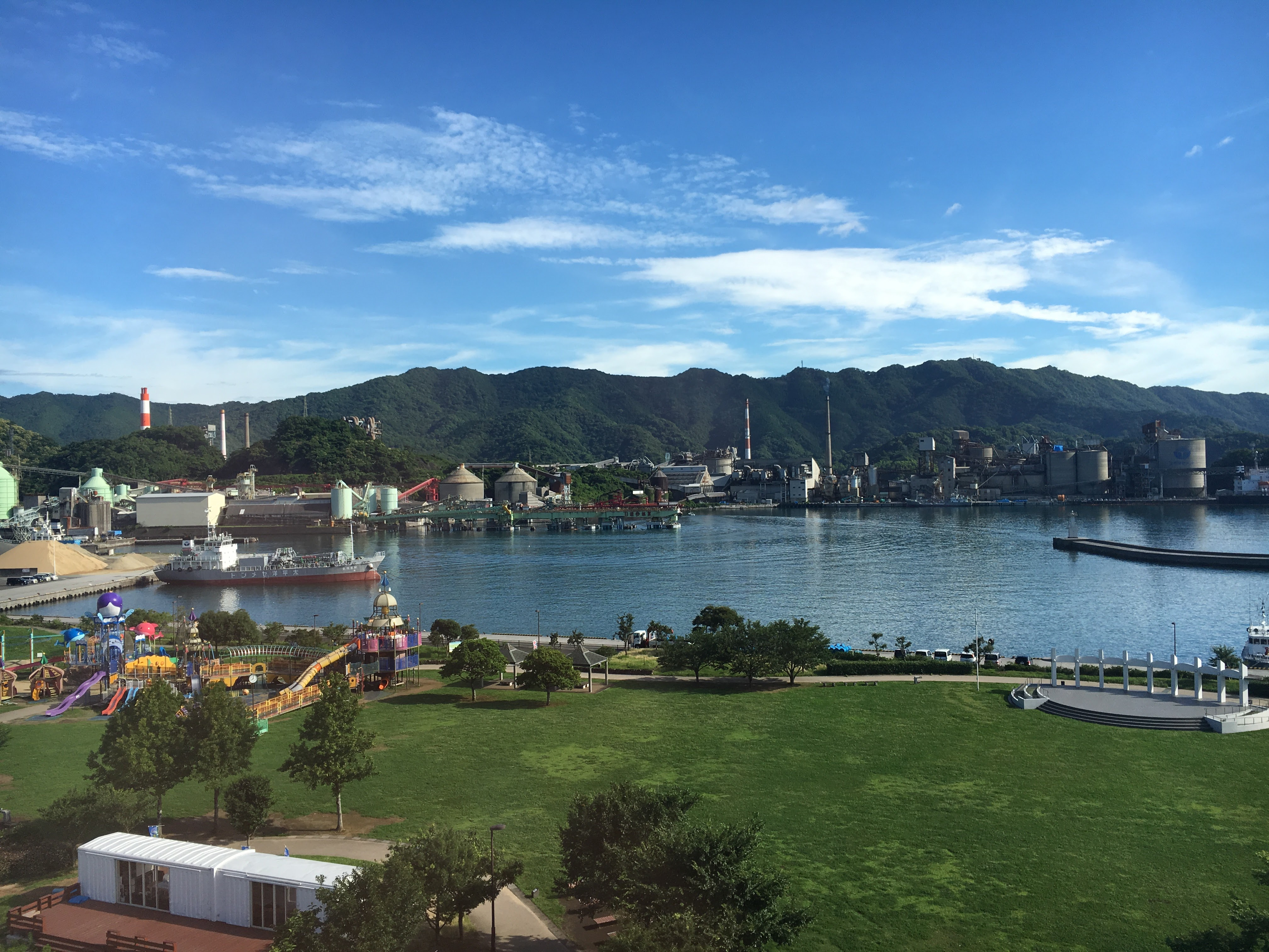 つくみん公園と工場（太平洋セメント大分工場）